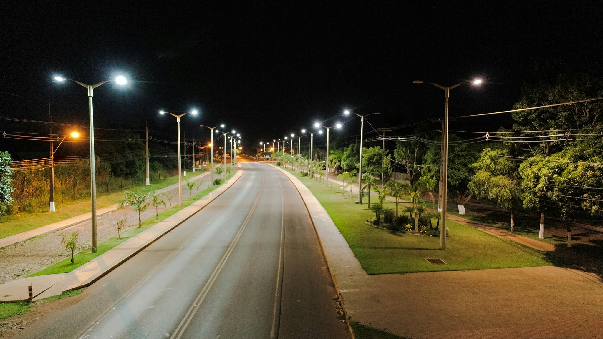 La entrada de la ciudad se caracteriza por el colorido jardín que recibe a los visitantes.